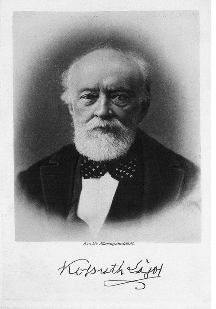 Kossuth Lajos portré és kézjegy, litográfia 1880 körül